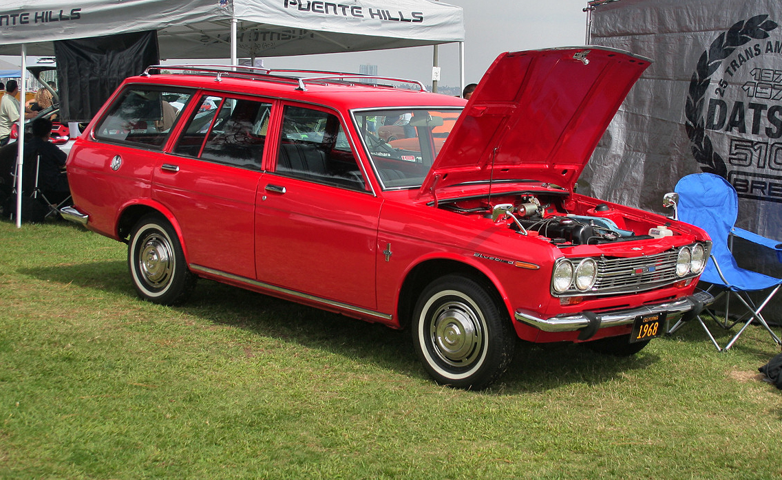 1968 Datsun Bluebird (510) wagon